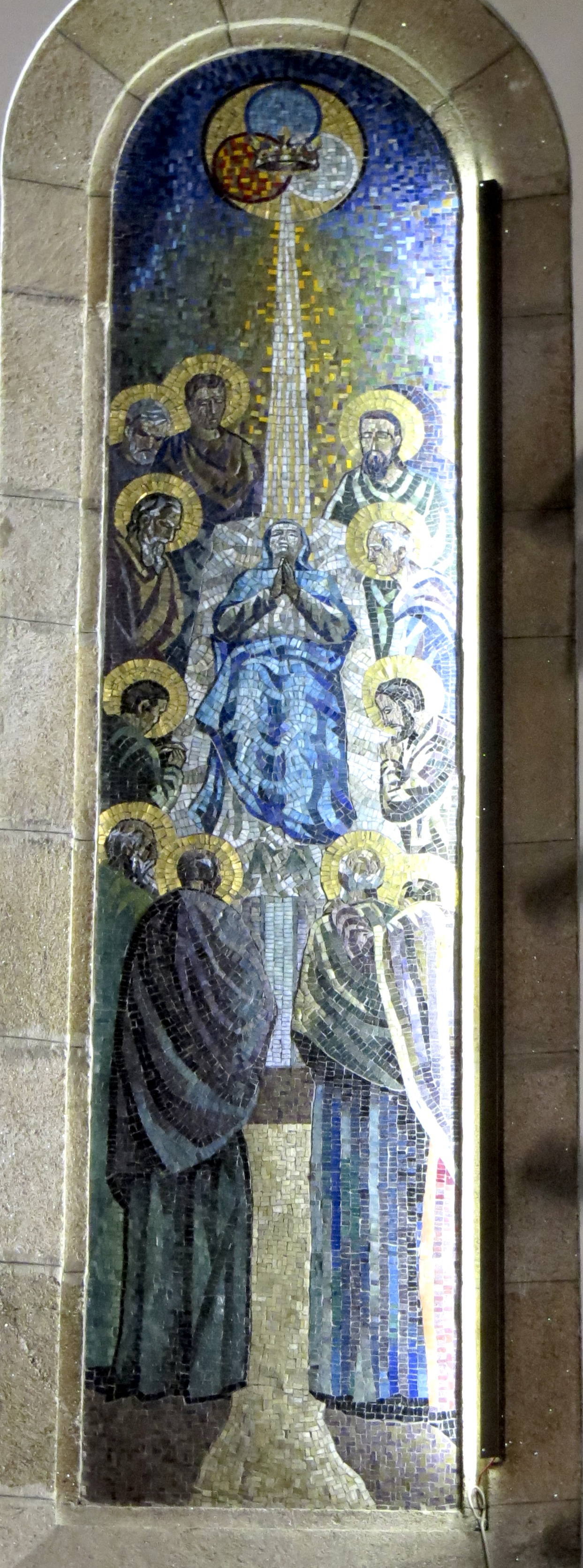 obra sobre el altar de la iglesia